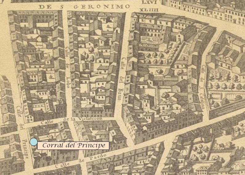 Localización aproximada del antiguo corral de comedias del Príncipe en el plano de Pedro Texeira, hacia 1656.